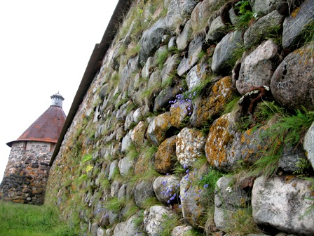 Типичный фрагмент стены Соловецкого монастыря